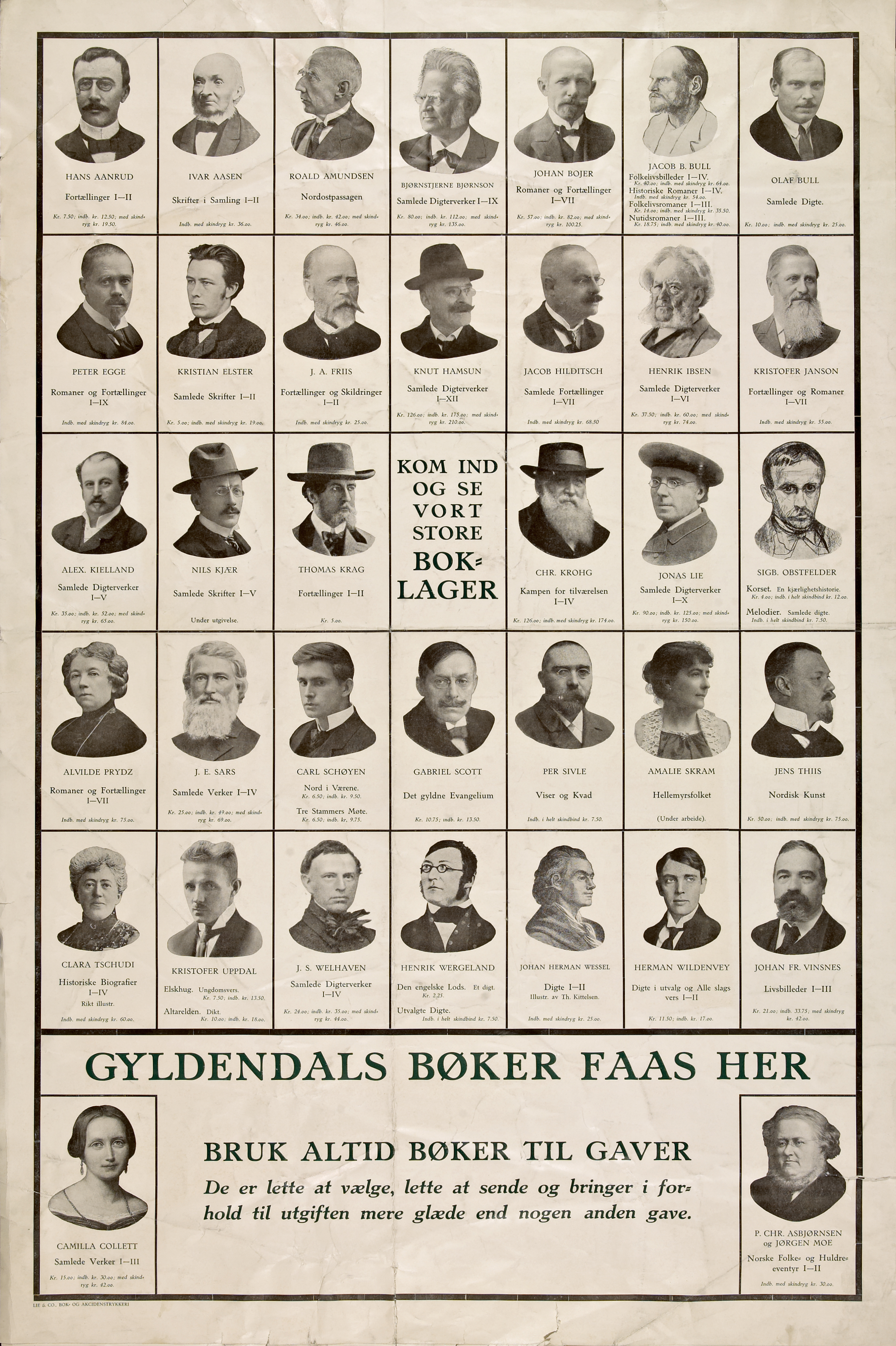 Beskrivelse / Description: Plakat / Poster (Reklameplakater for bøker/book posters) Utgiver / Publisher: Gyldendal Størrelse / Size: 96 x 64 cm Dato / Date: [1918] Eier / Owner Institution: Nasjonalbiblioteket / National Library of Norway Lenke / Link: Bildesignatur / Image Number: no-nb_plktr_01875